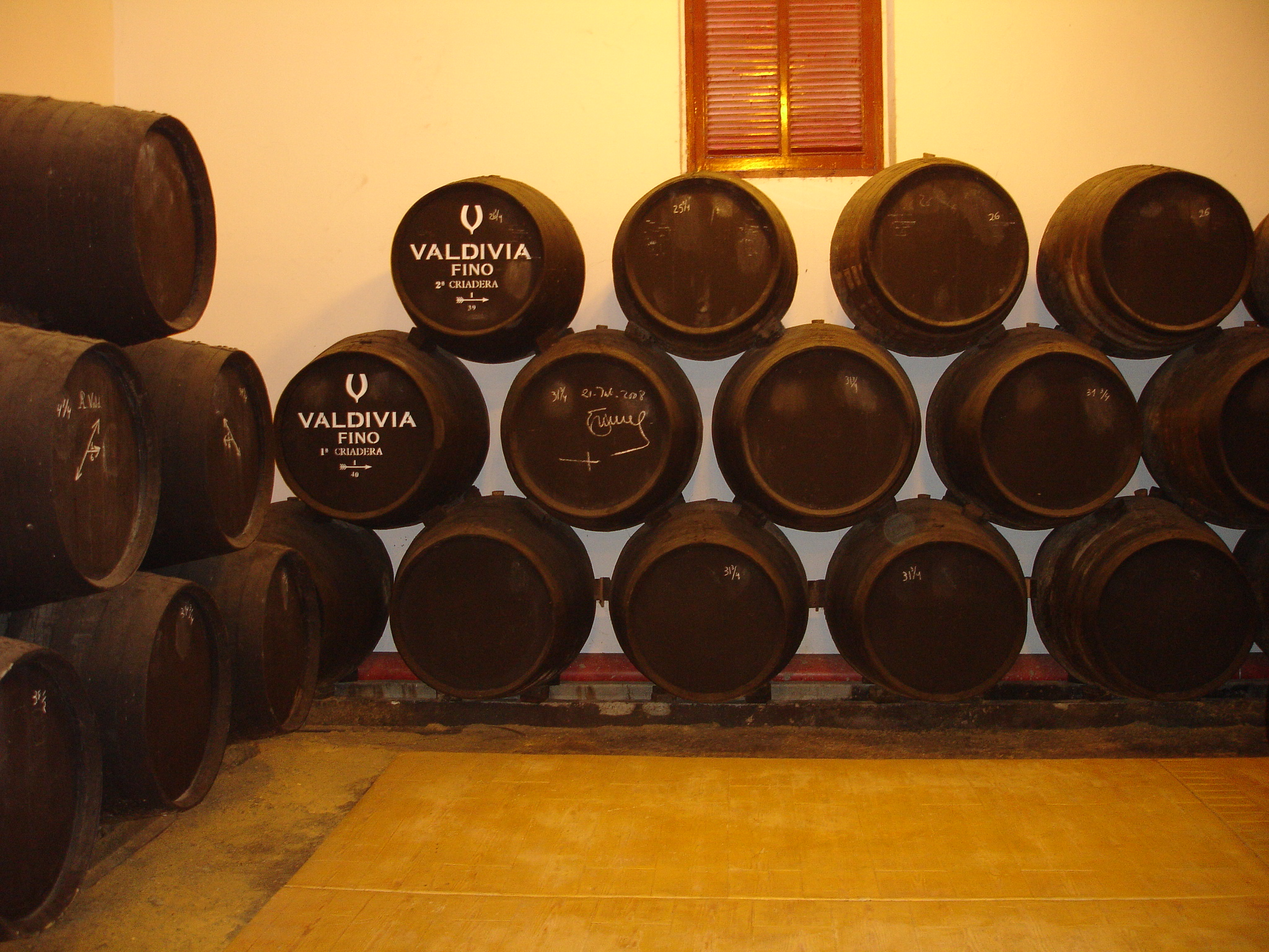 Valdivia in Jerez, Andalusia (Spain)